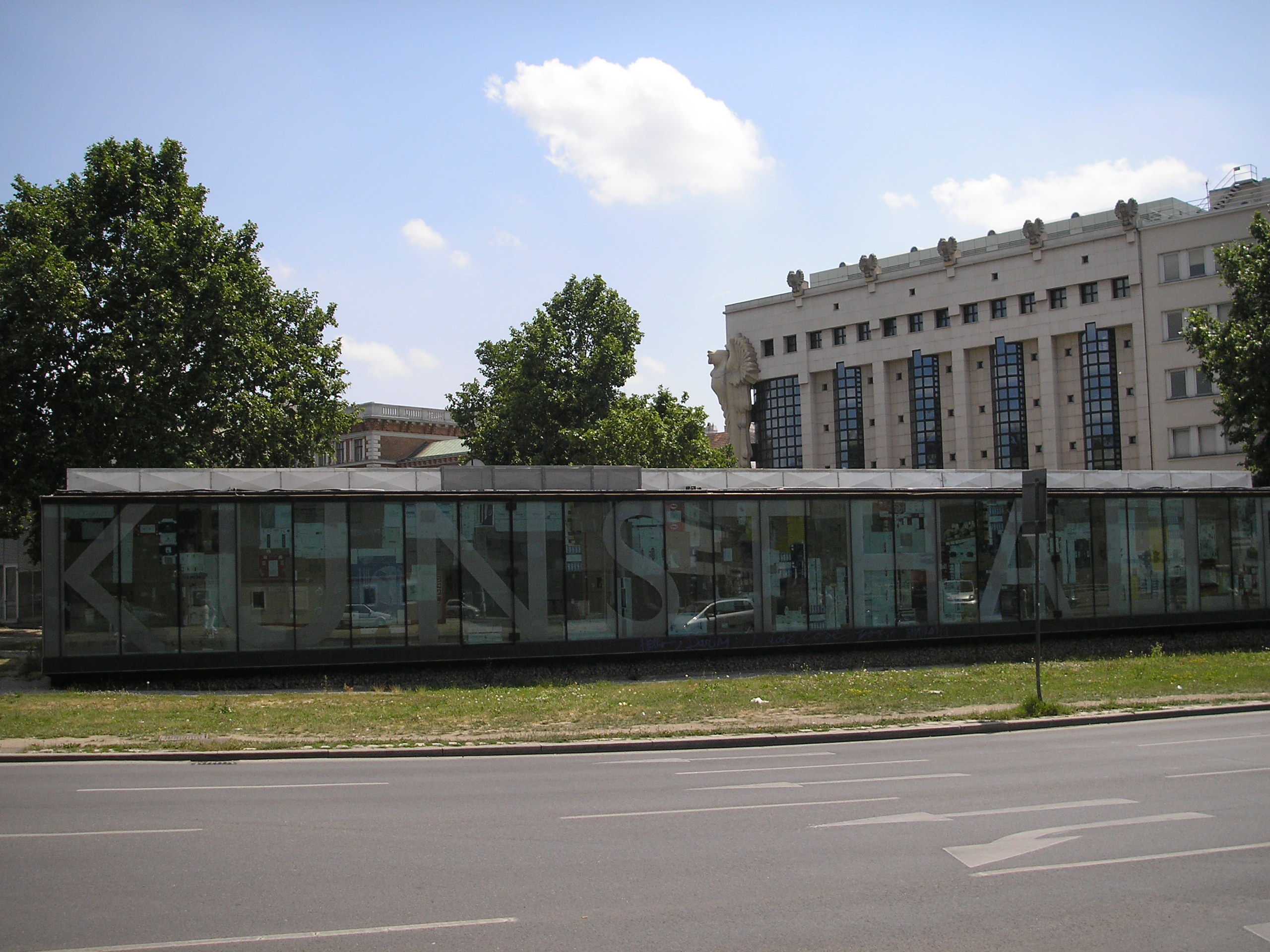 Kunsthalle at the Karlsplatz in Vienna, Architect Adolf Krischanitz.